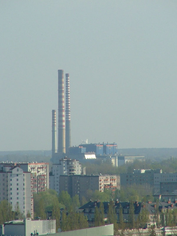 PL, Warsaw, Poland, Mokotów, Elektrociepłownia Siekierki